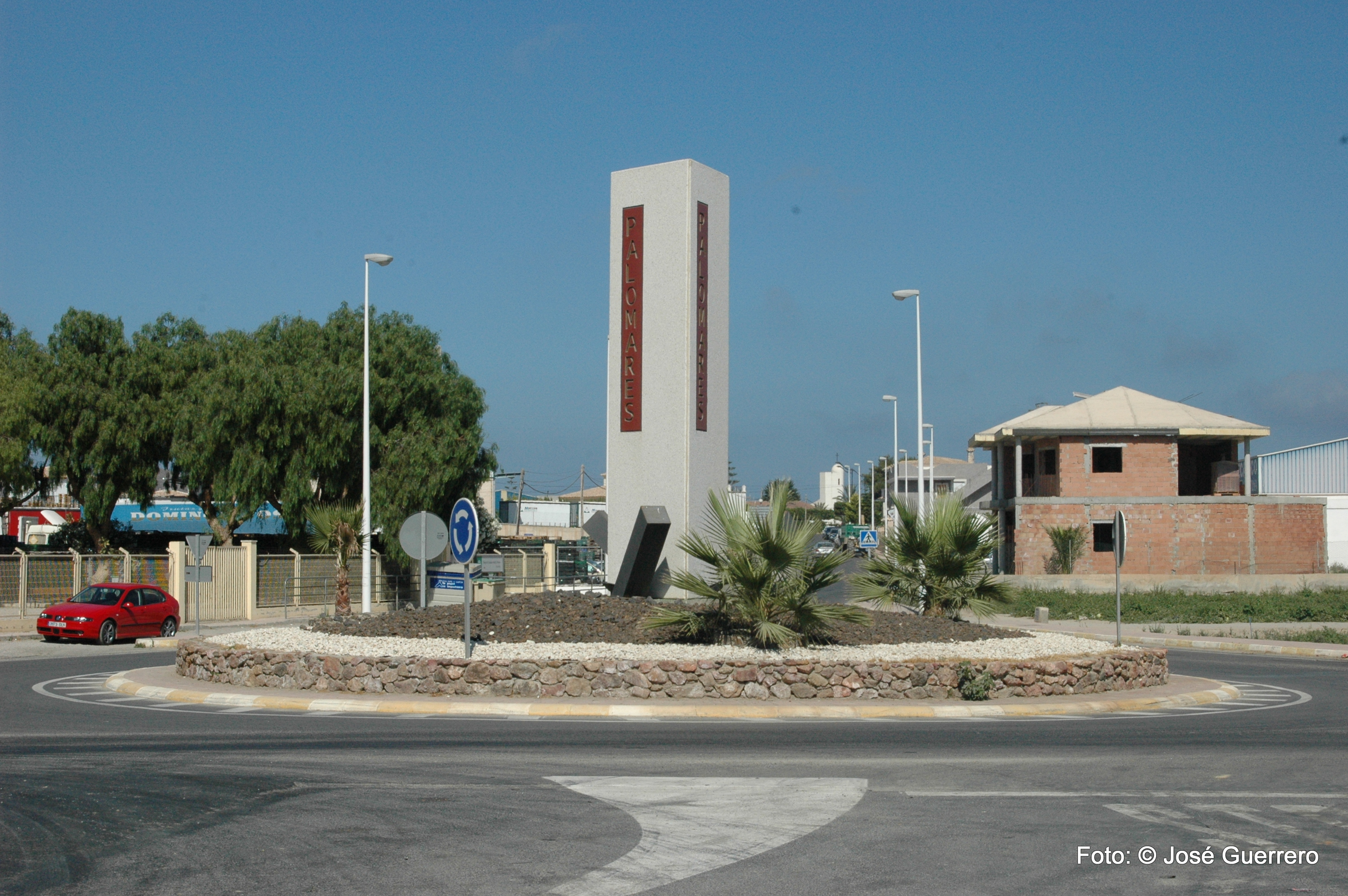 Pedanía de Cuevas del Almanzora